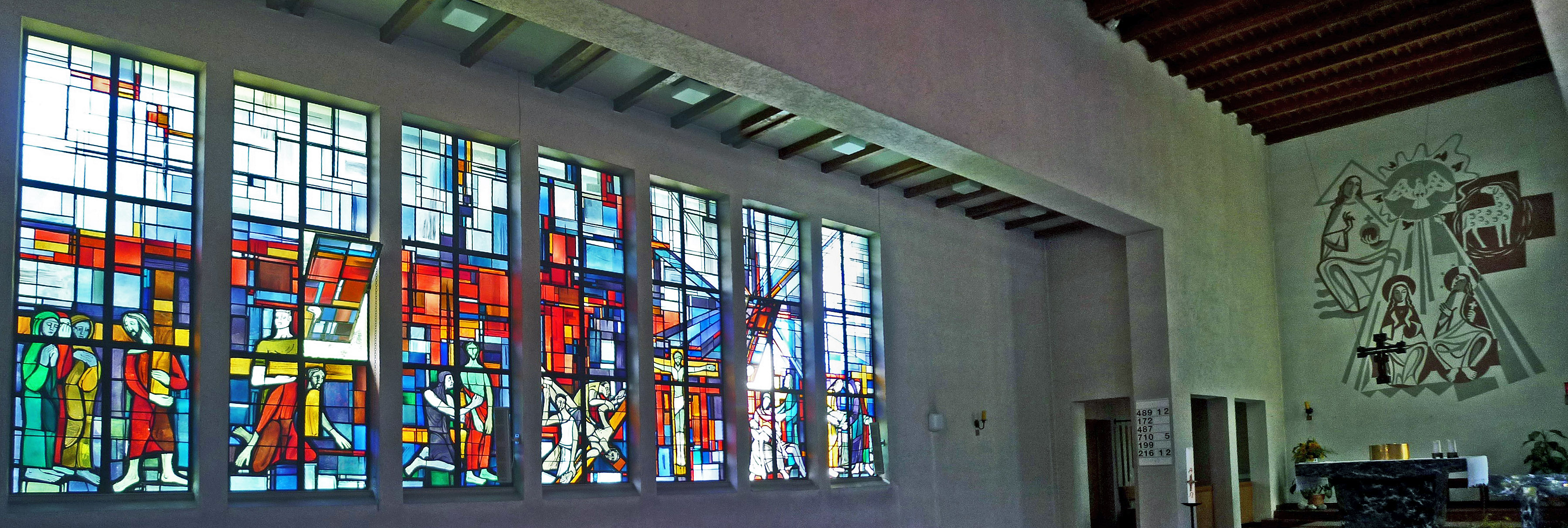 Innenraum der Pfarrkirche hl. Johannes Nepomuk in Lorüns